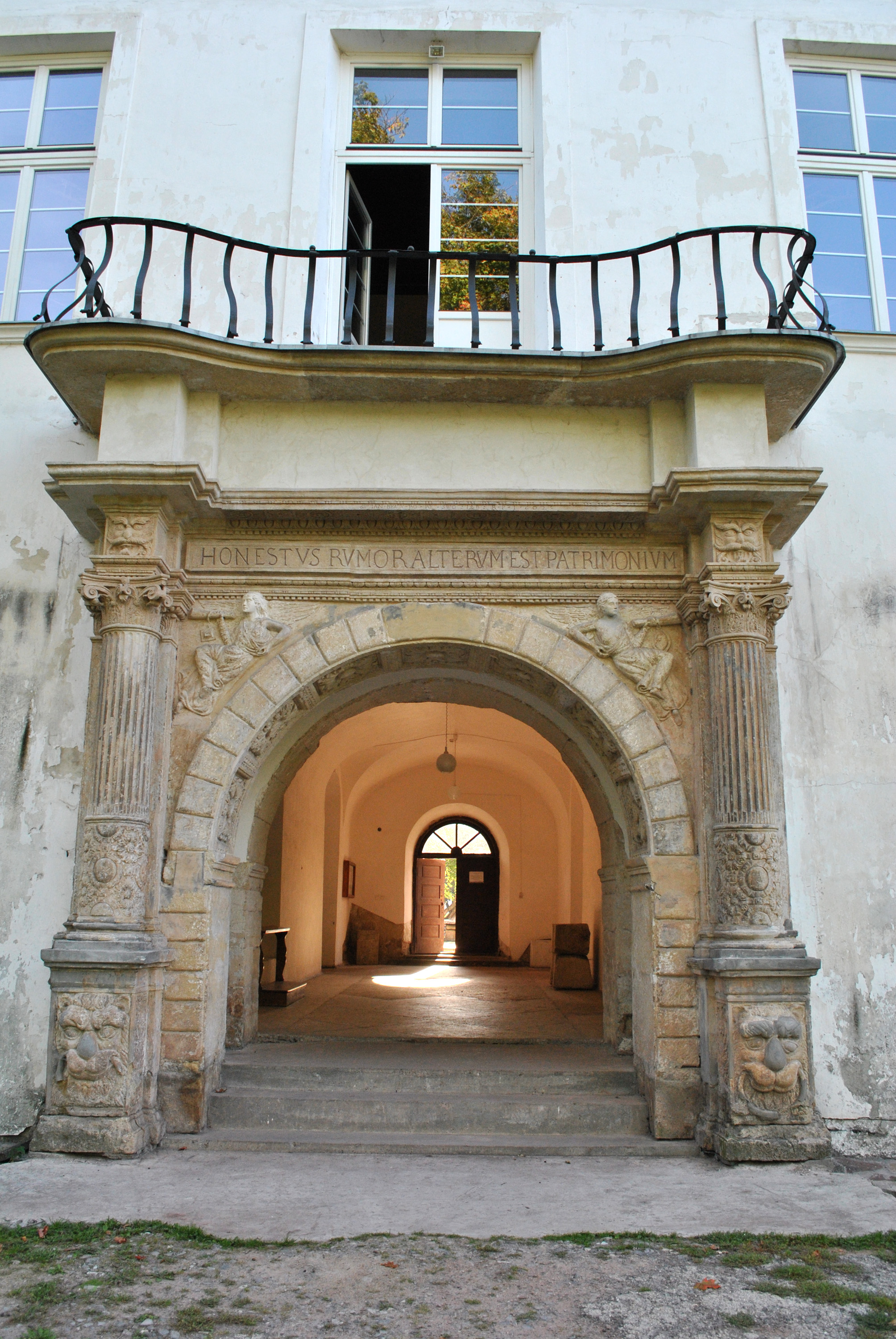 Палац XVII-XVIII ст. (мур.) у селі Язловець Бучацького району Тернопільської області. Портал із боку парку.